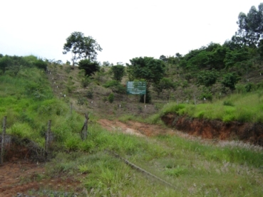 Vista parcial do Bosque Municipal do Bairro Floresta, em Caratinga, Minas Gerais, Brasil.